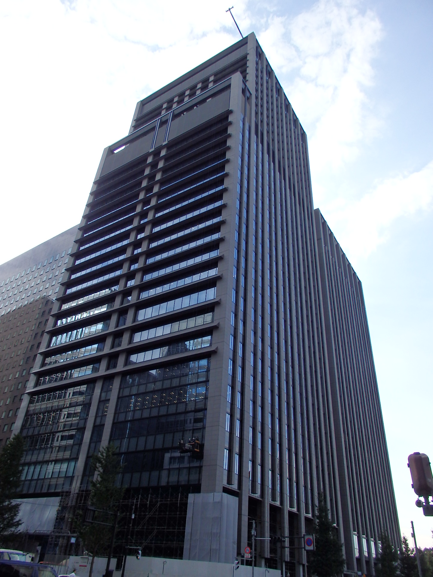 大手町パークビルディング